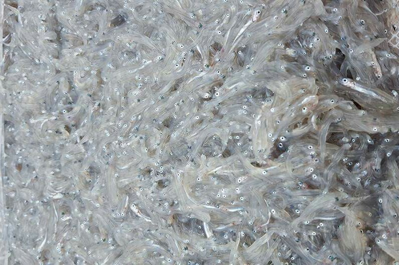 Novellame di pesce azzurro pescato nel canale di Sicilia